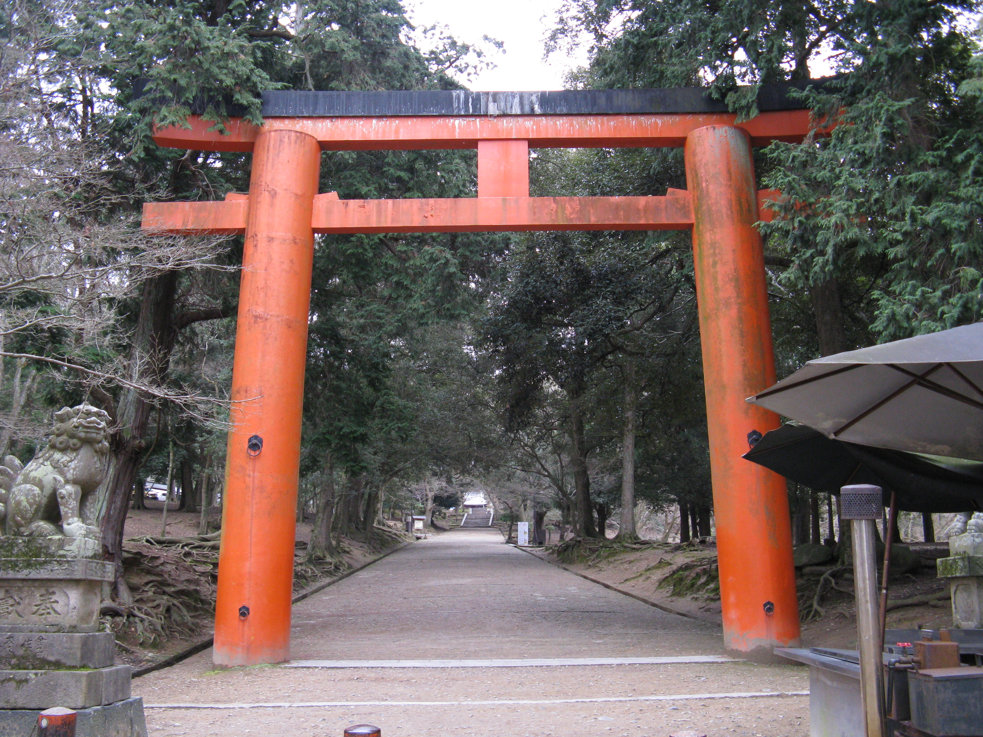 手向山八幡宮